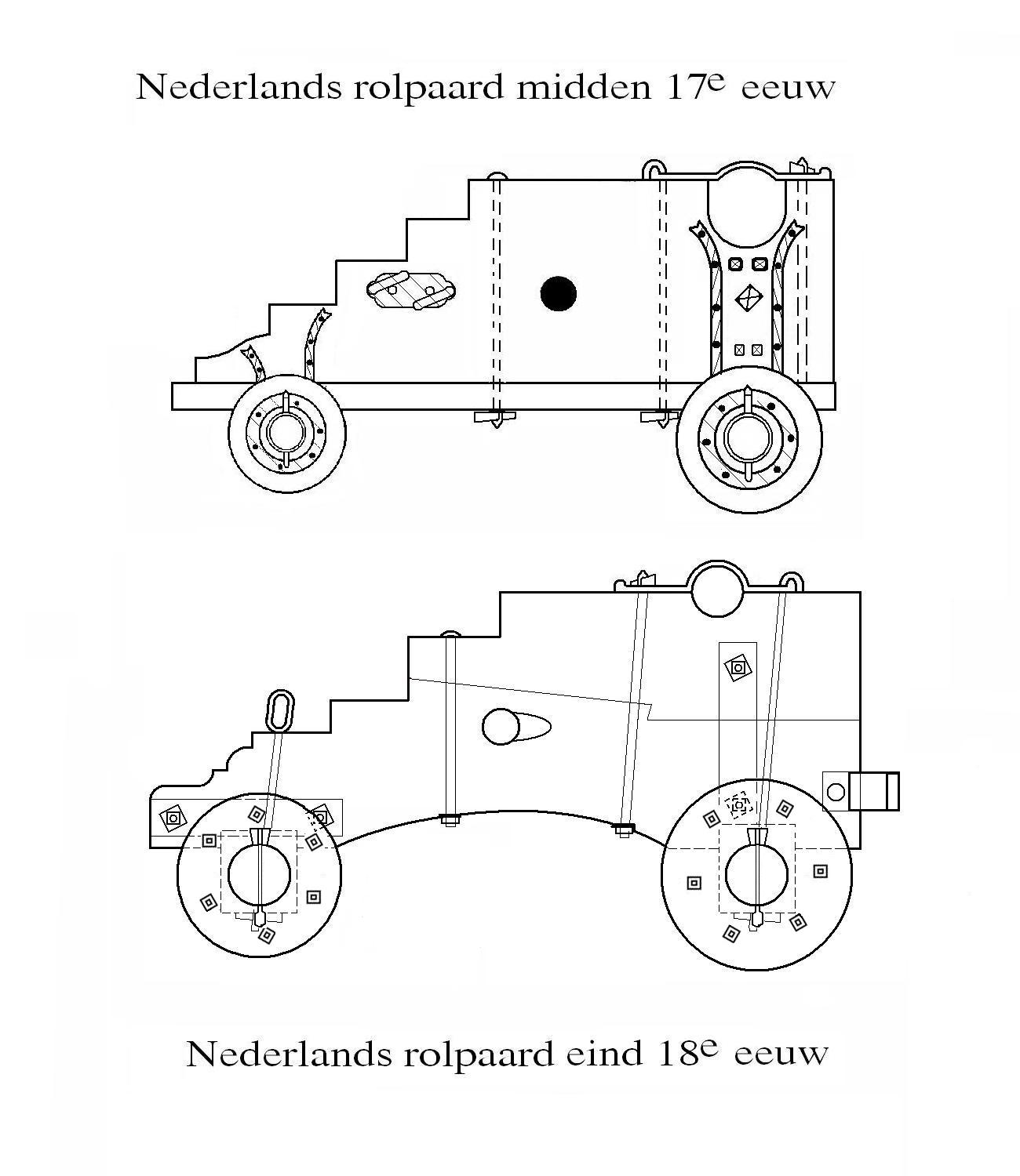 tekening van twee historische rolpaarden